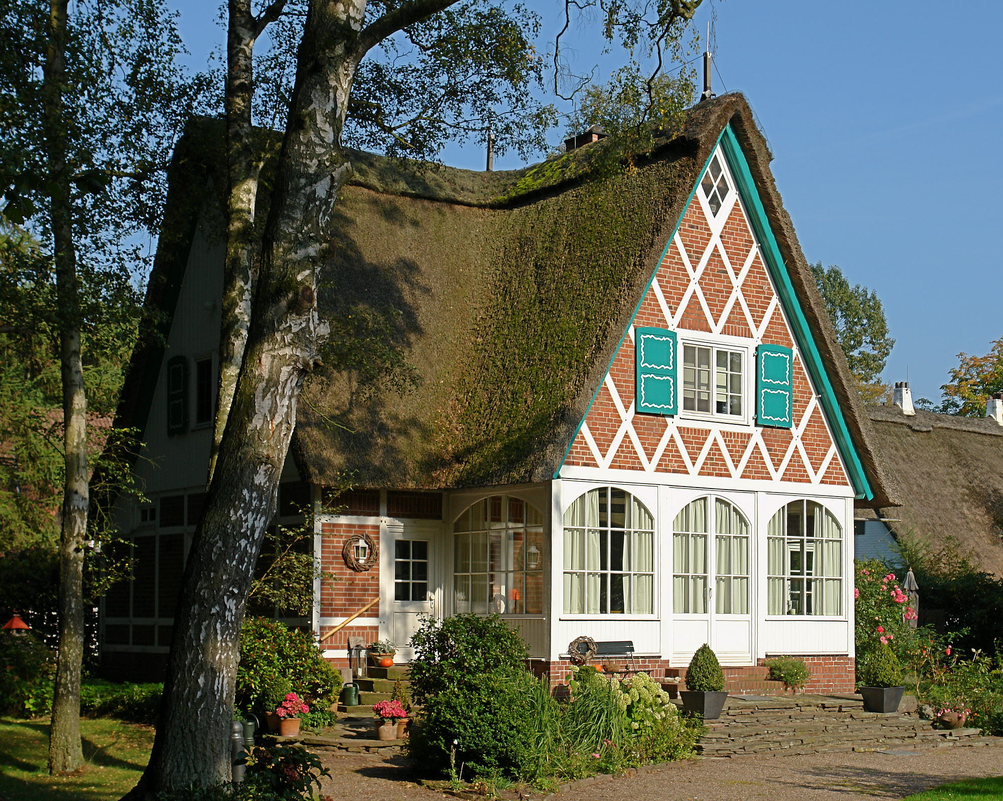 Wohnhaus in Bremen, Oberneulander Landstraße 141A.Das abgebildete Objekt ist ein geschütztes Kulturdenkmal in der Freien Hansestadt Bremen, mit der Nr. 0950 beim Landesamt für Denkmalpflege registriert.